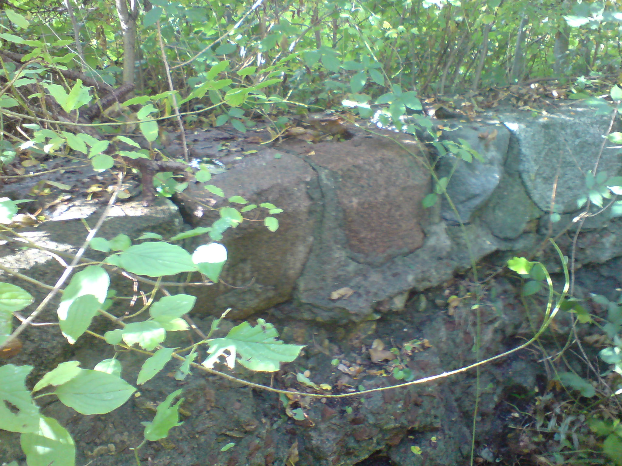 Geschützstellung bei Stralsund; Leitring, auf dem die Kanone gerichtet wurde mit Betonfundament